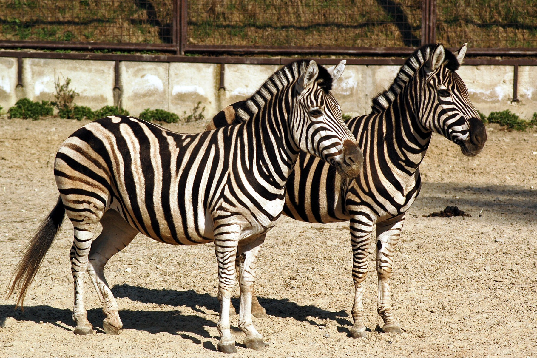 Zebra